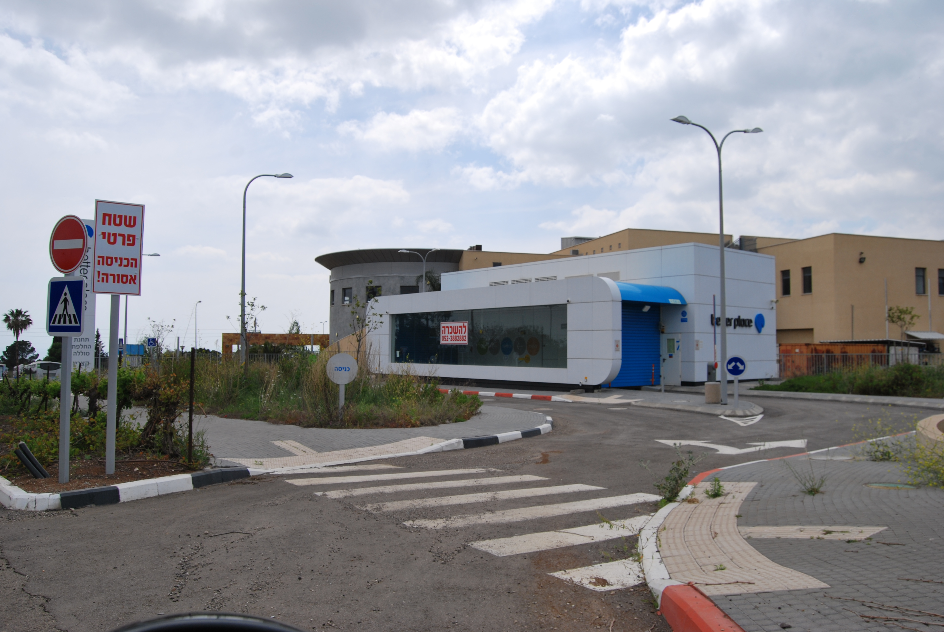 תחנה להחלפת סוללות בטר פלייס בקצרין מועמדת להשכרה לאחר שנסגרה